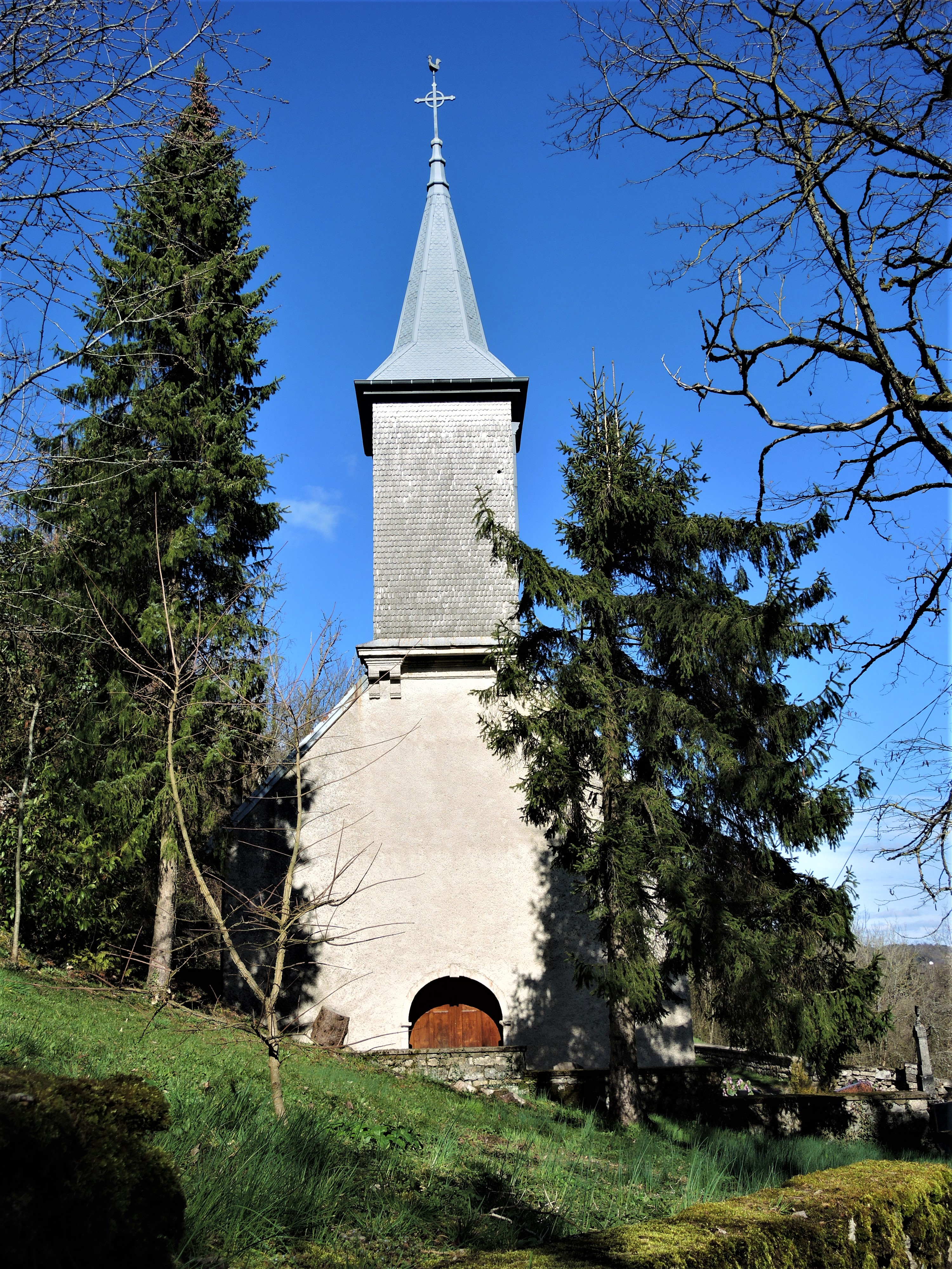 Eglise d'Arguel. Doubs